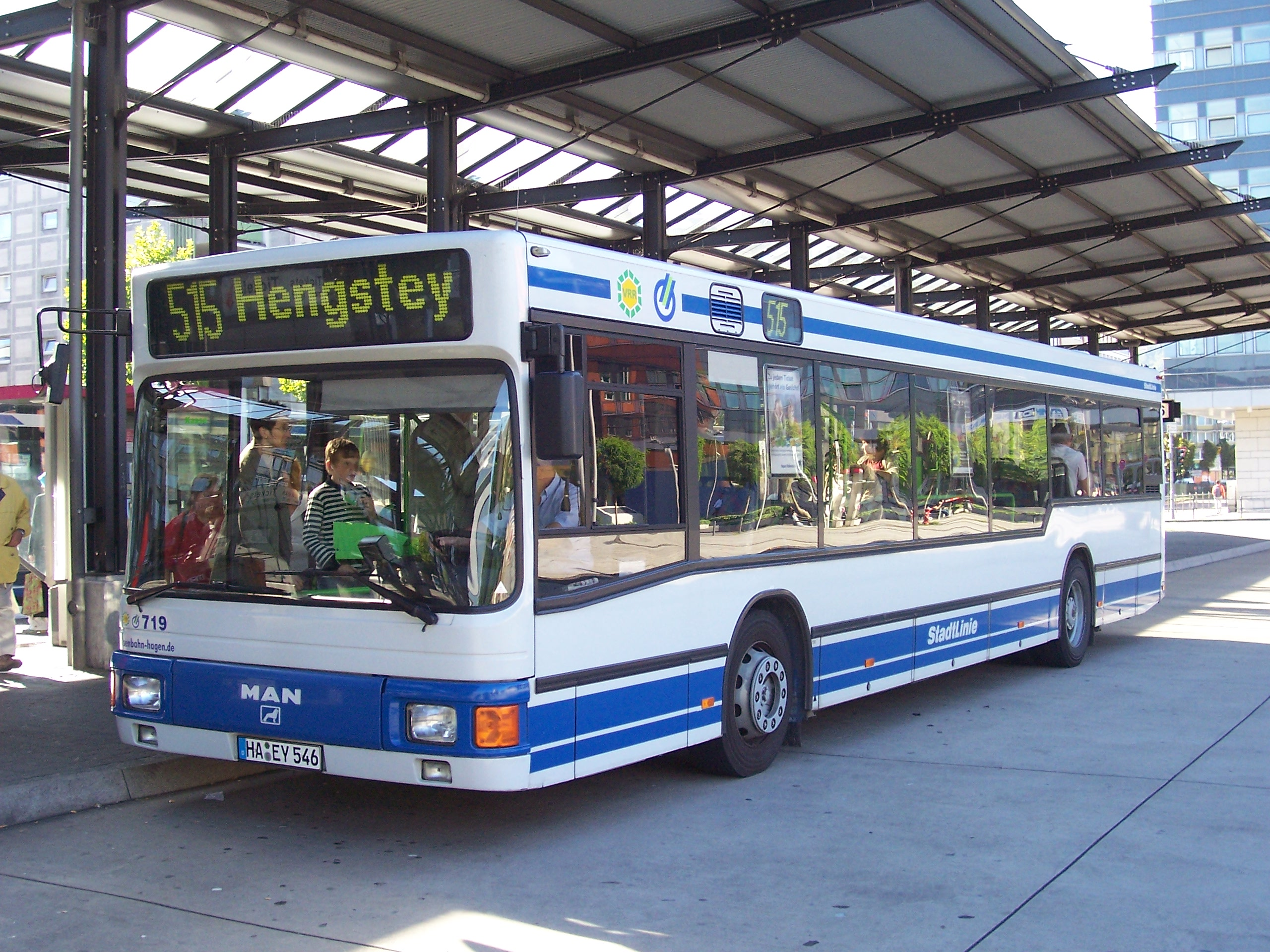 MAN NL 262 Stadtlinienbus der Hagener Straßenbahn AG an der Haltestelle Hagen-Hauptbahnhof